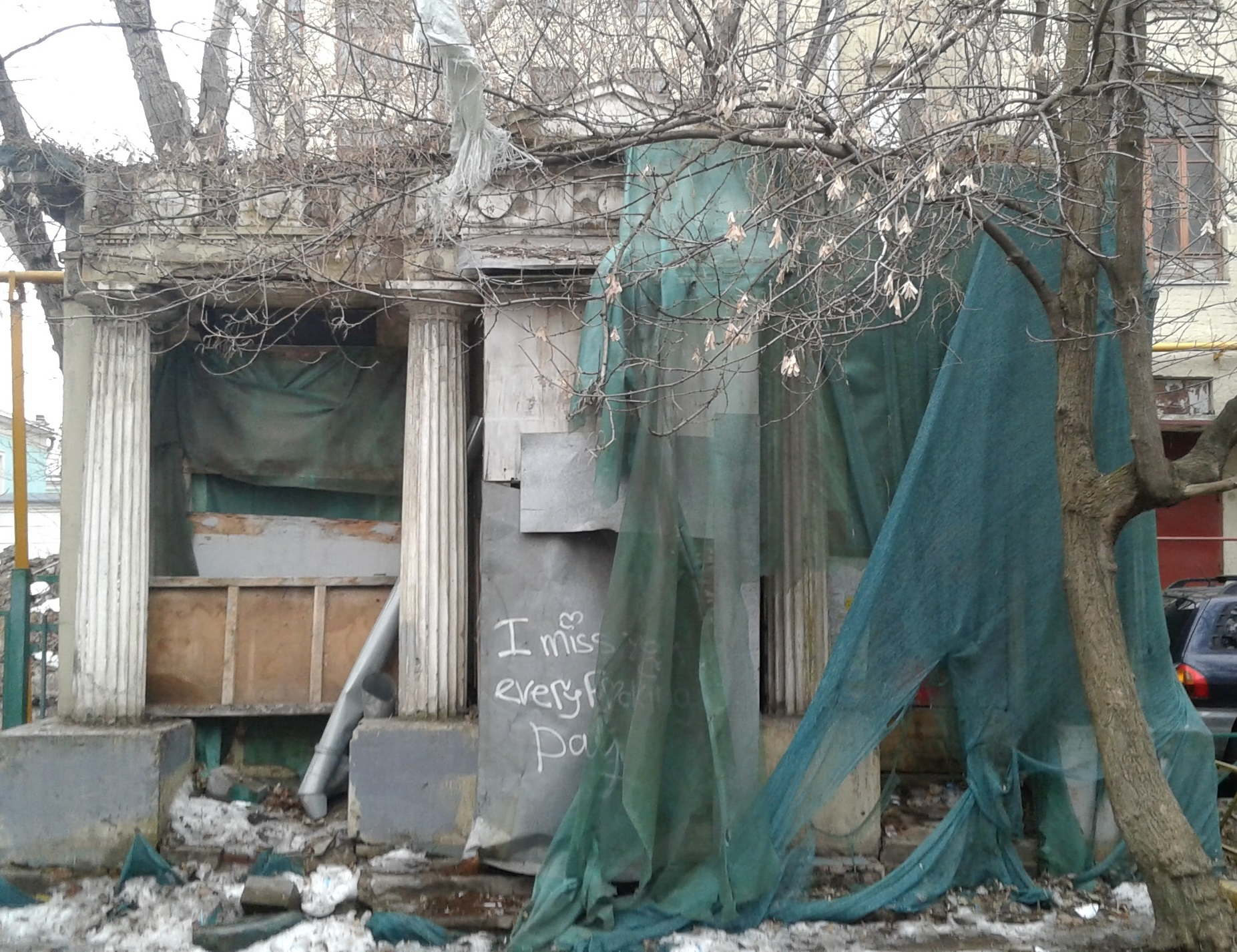 Памятник архитектуры - Садовый павильон в переулке Сивцев Вражек, район Арбат, Москва